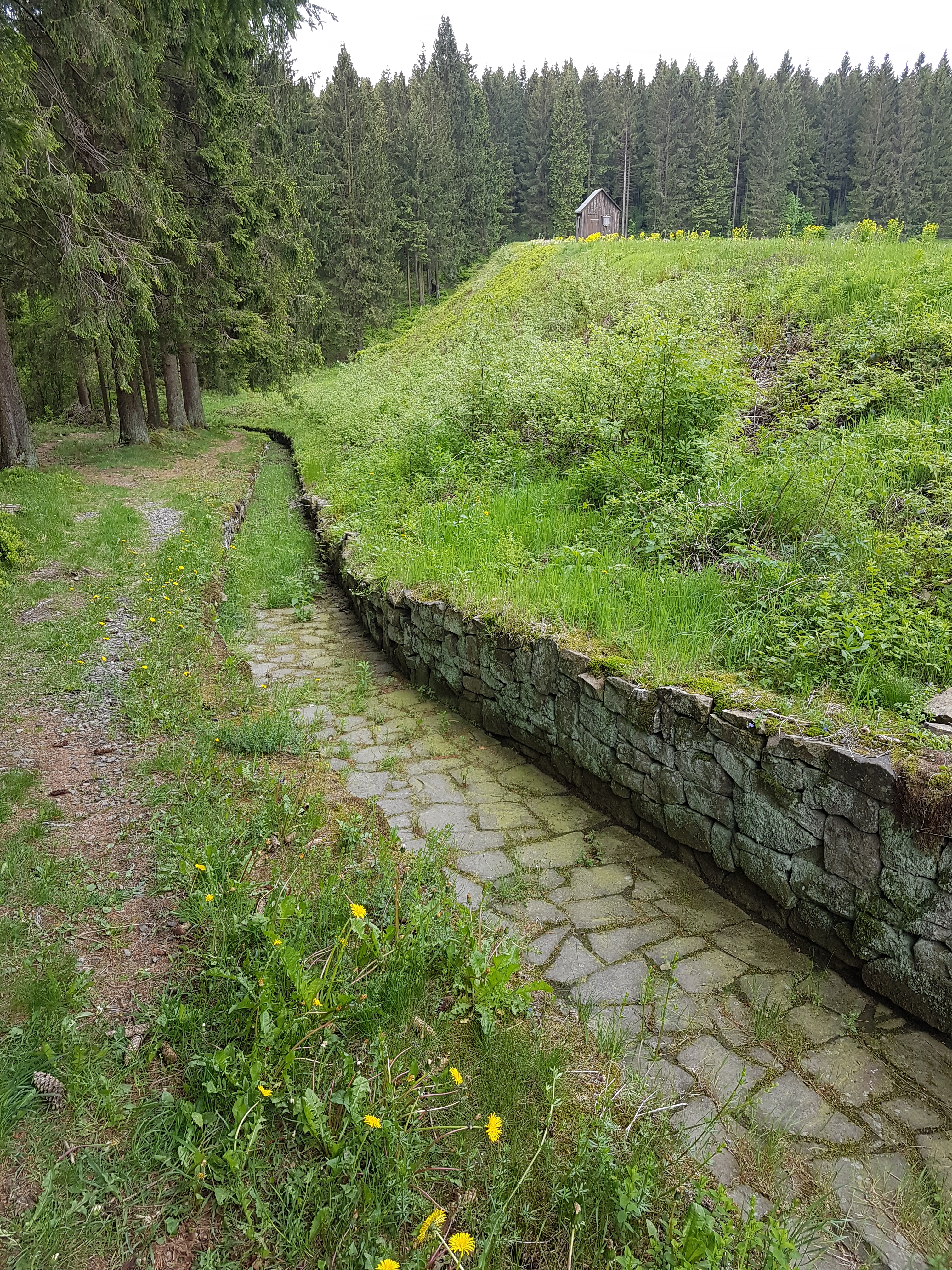 12.1-Gerenne mit Damm, 26-05-2019